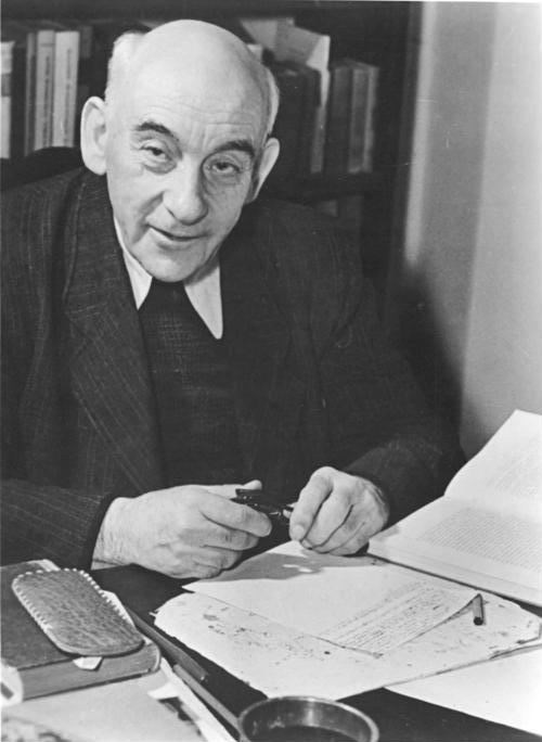 Zentralbild-Höhne-Pohl 2.10.1954 Kandidat zur Wahl der Volkskammer (Bezirk Dresden) Professor, Dr. Dr. Viktor Klemperer, Direktor des Instituts für Romanistik Humbold-Universität.